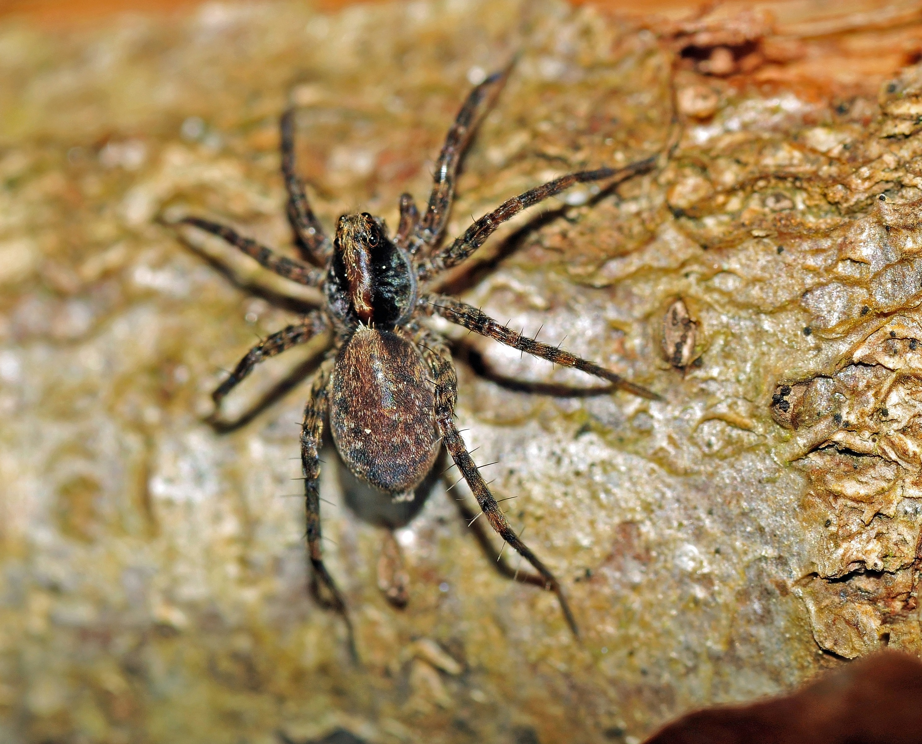 Pardosa lugubris (Walckenaer, 1802)